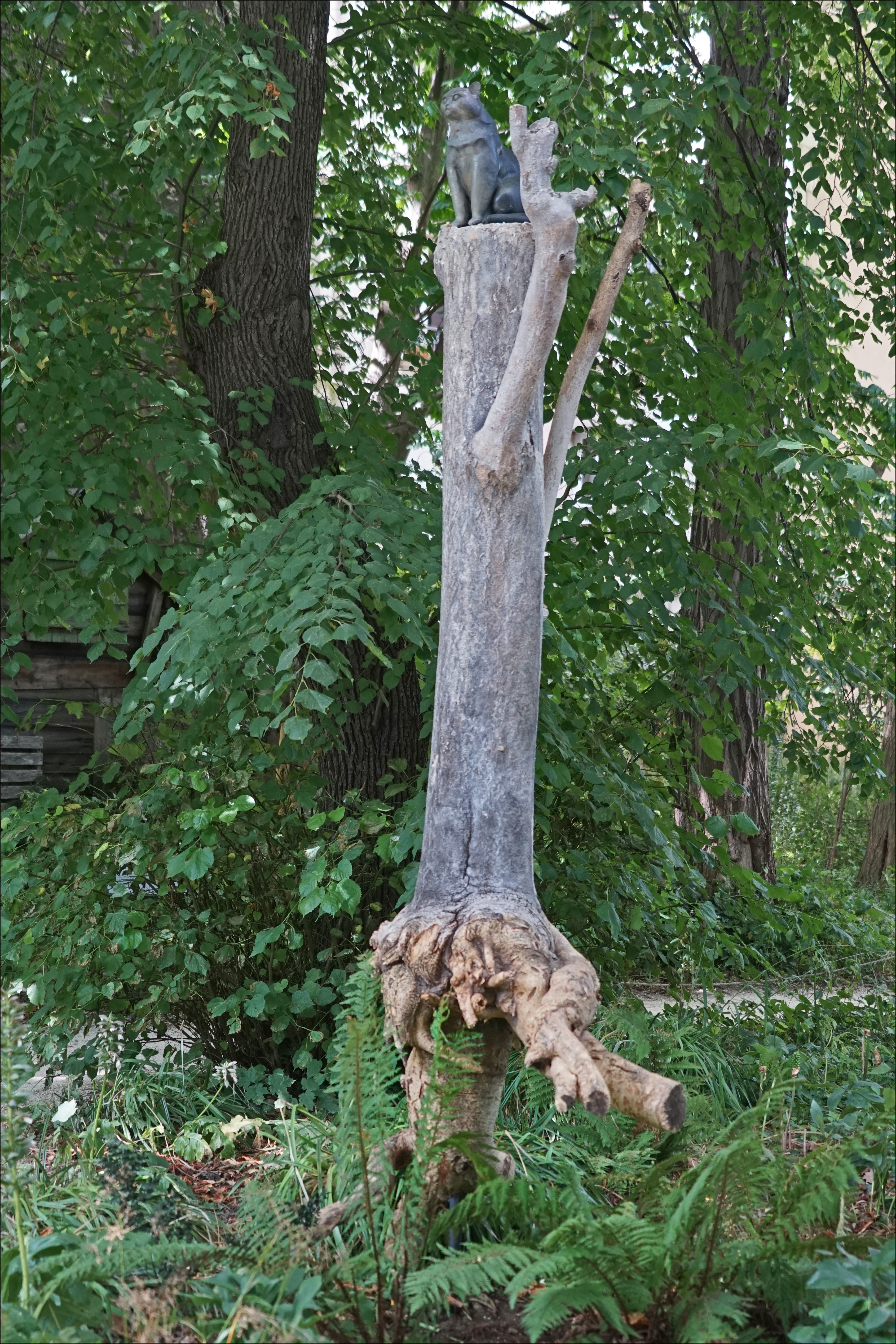 Nini sur son arbre Création d'Agnès Varda (1928-2019) pour l'exposition "Nous les Arbres" mars 2019 Chat en bronze patiné par Gilles Nicolas, Fonderie Susse, Paris Jardin de la Fondation Cartier Agnès Varda à la Fondation Cartier lors d'une "nuit de l'incertitude" en septembre 2018 (photo Dalbéra) Réunissant une communauté d’artistes, de botanistes et de philosophes, la Fondation Cartier pour l’art contemporain se fait l’écho des plus récentes recherches scientifiques qui portent sur les arbres un regard renouvelé. Extrait du site officiel L'exposition "Nous les arbres" à la Fondation Cartier pour l'art contemporain, Paris "Nous les Arbres", from July 12, 2019 to January 5, 2020, Fondation Cartier, Paris, France.